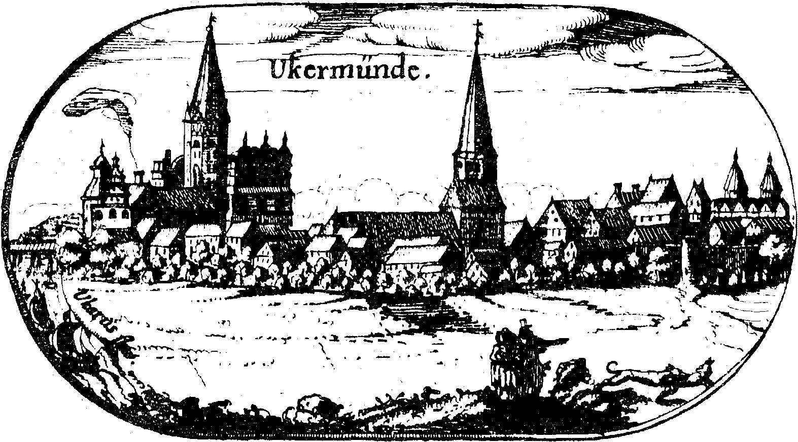 Ansicht von Ueckermünde (zwischen 1614 und 1617)